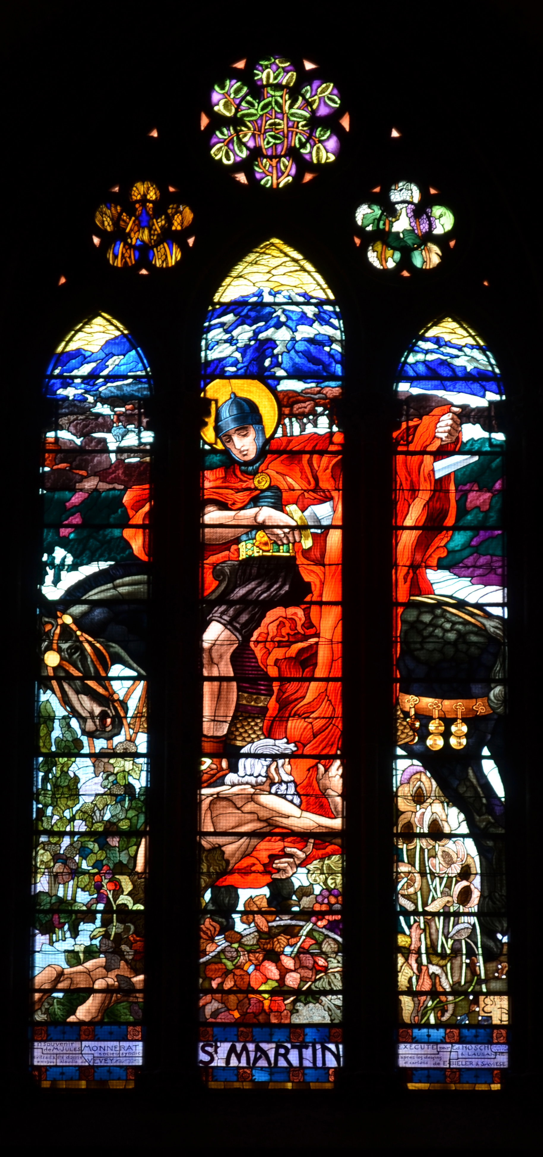 Église réformée Saint-Martin de Vevey - le chœur - vitrail représentant saint Martin, le patron de l'église, partageant son manteau. Il fut dessiné par Ernest Biéler et réalisé en 1900 par le peintre verrier Edouard Hosch. Source : Henri Piguet, Aux visiteurs de l'église Saint-Martin de Vevey. Notice historique, 1993.